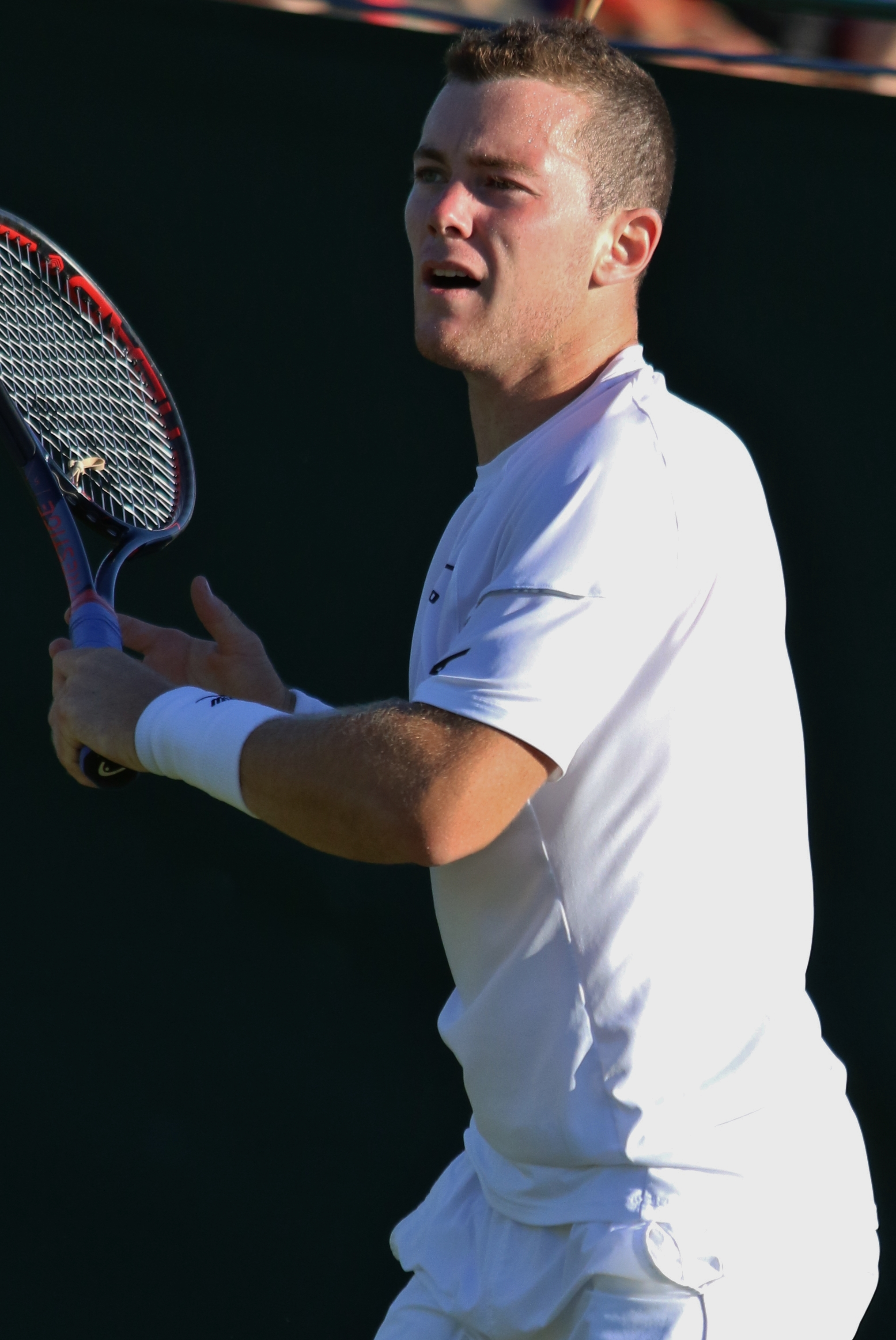 Koepfer WMQ18 (11)